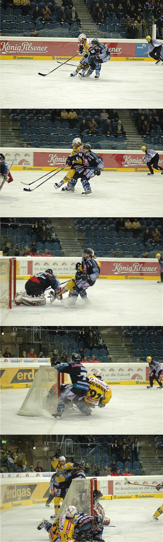 Torschussszene/ Alexander Seliwanow (Krefeld Pinguine) - Nürnberg IceTigers